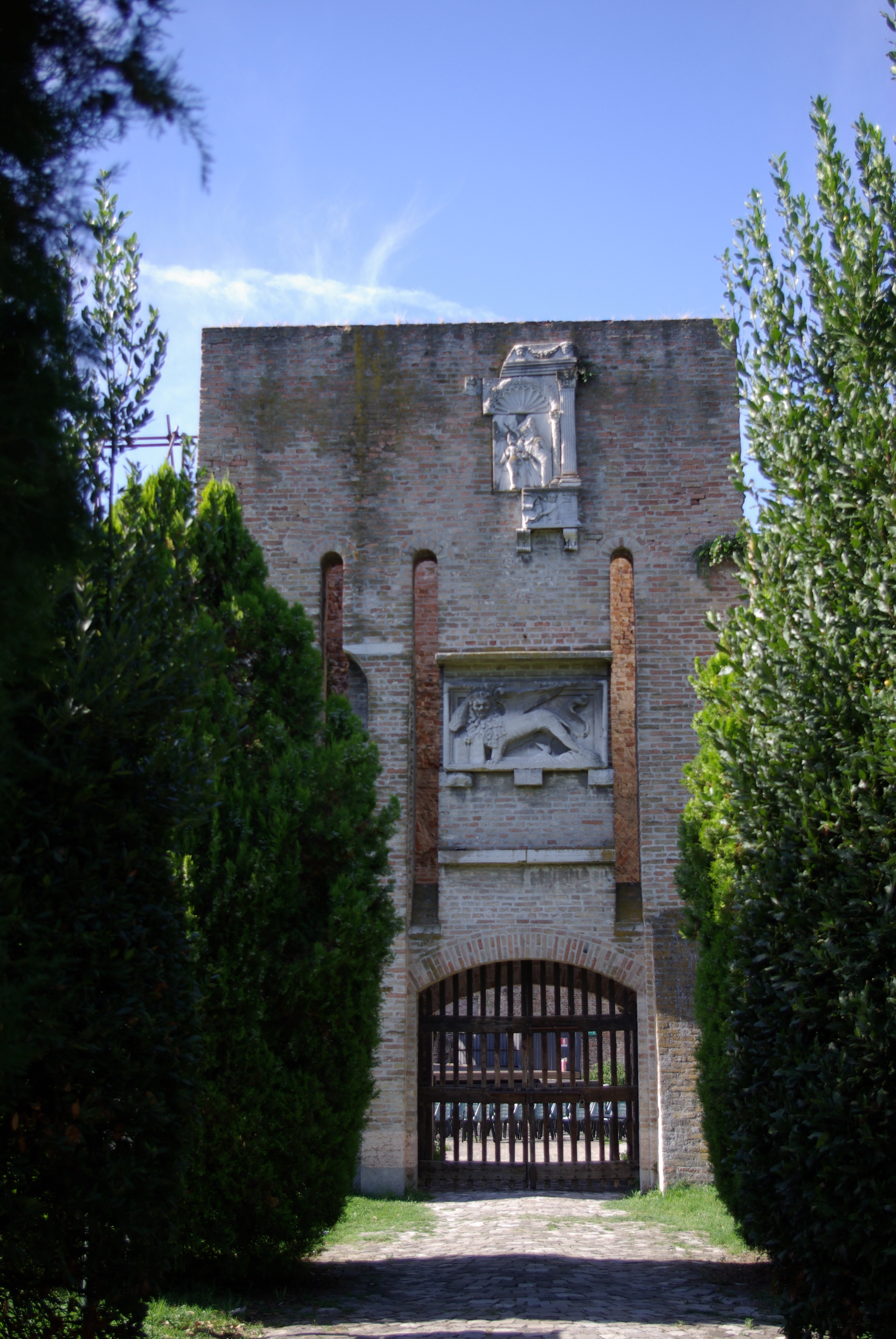 Torre della Cappella, all'interno della Rocca Brancaleone (Ravenna) This is a photo of a monument which is part of cultural heritage of Italy. This monument needs check. The problem is the following: this monument is not listed in the monument list.